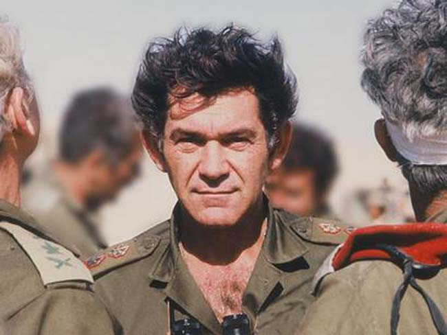 הרמטכ"ל דוד אלעזר בצבע. הרמטכ"ל דוד (דדו) אלעזר בעת מלחמת יום הכיפורים. עם הגב למצלמה מימין אריאל שרון ומשמאל חיים בר לב.